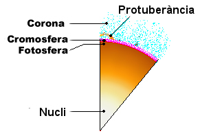 Estructura solar en català